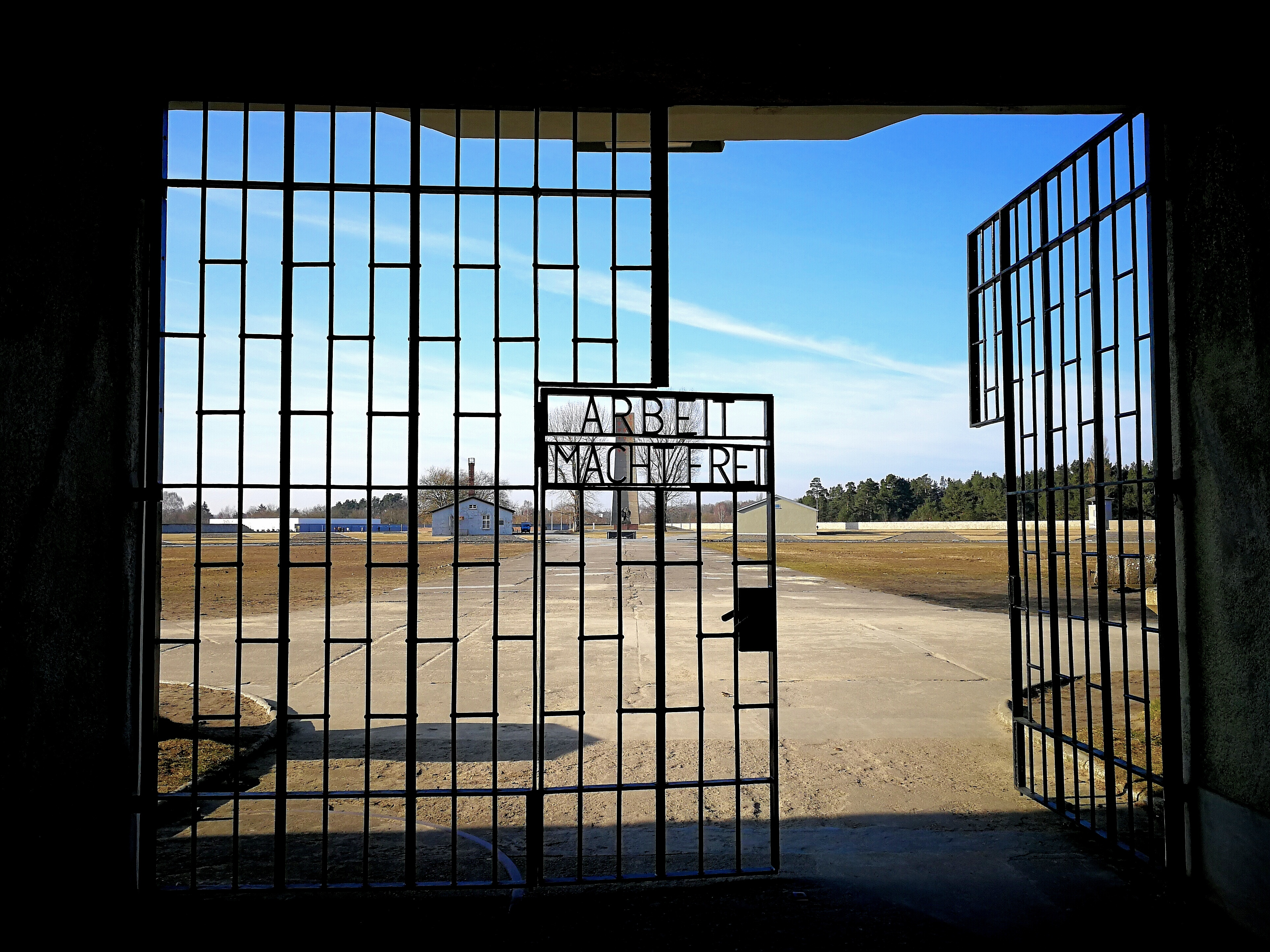 Sachsenhauseni koonduslaagri värav.